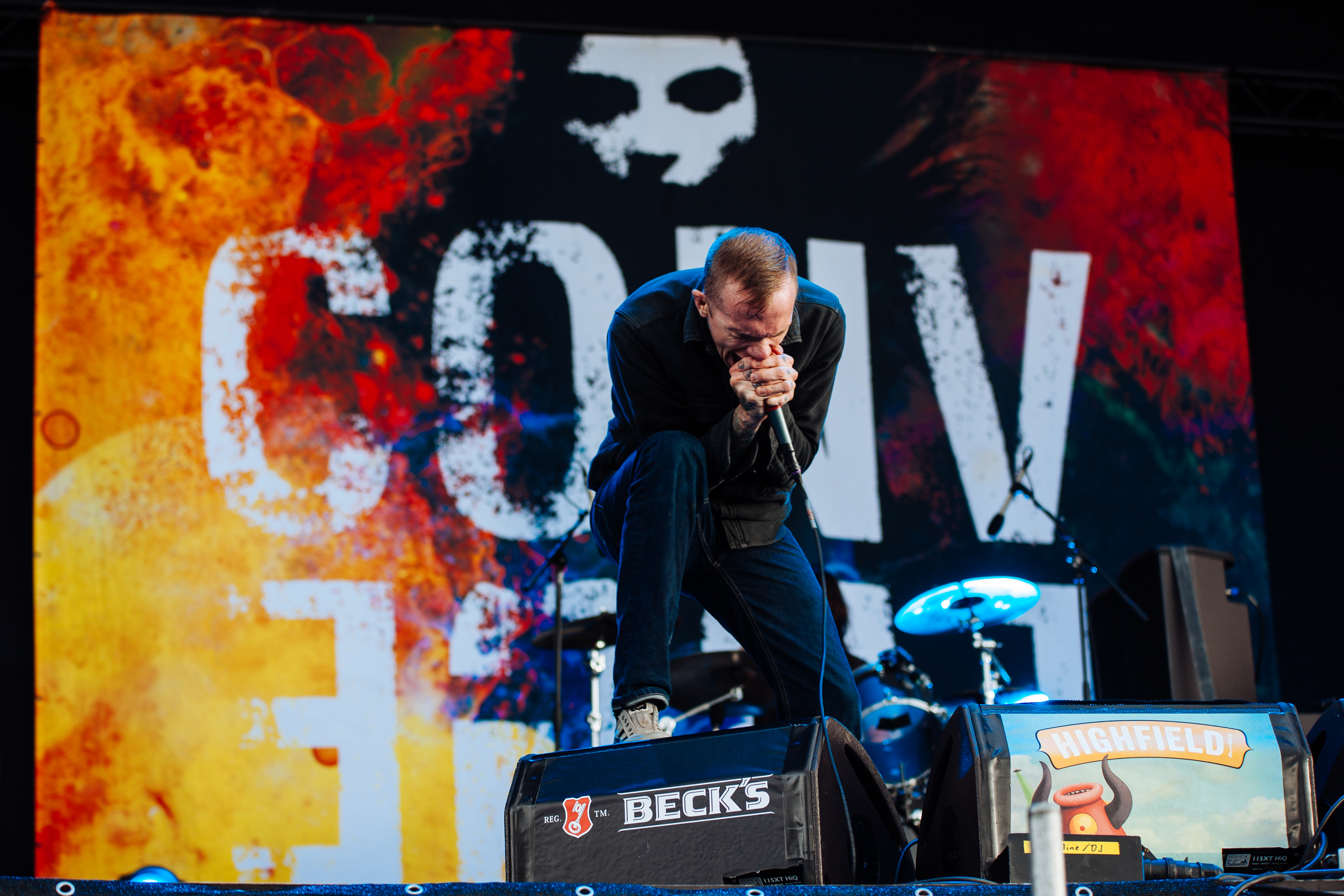 Converge Sänger Jacob Bannon